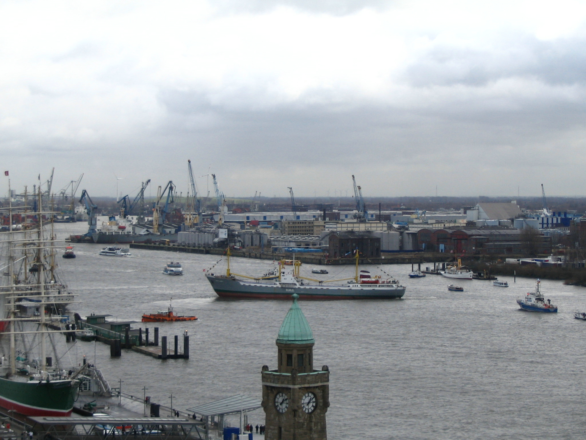 Museumsschiff Old Lady bei der Ankunft im Hamburger Hafen. Inzwischen ist das Schiff wieder in Bleichen zurückbenannt.